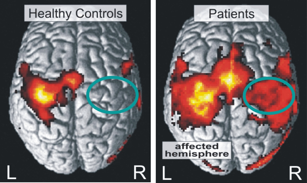 Cortical Activation in Healthy Subjects and Stroke Patients